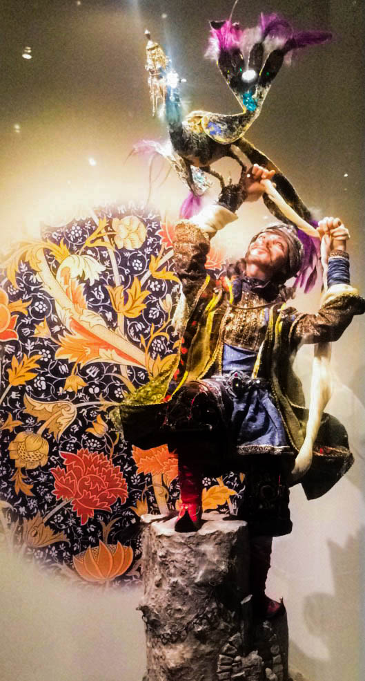 Məlikməmməd və Simurq quşu, Elmira Abbaslı, tək nüsxəli əl işi. Heydər Əliyev Mərkəzinin kolleksiyası.